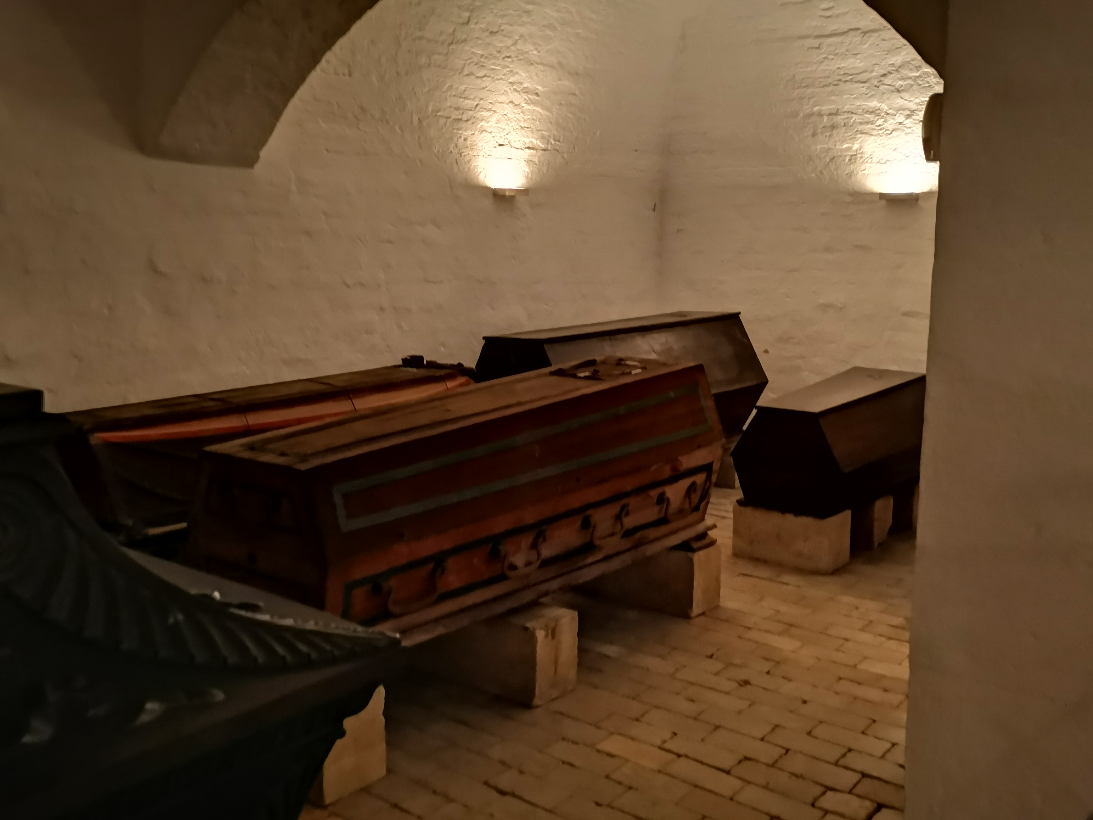 Fürstengruft Weimar; Särge von Herzogin Ida (1794–1852), Herzog Bernhard (1792–1862) (vorn von links nach rechts); Prinzessin Wilhelmina Augusta (1717–1752), Prinzessin Johanna Eleonora Henrietta (1721–1722), (hinten von links nach rechts)